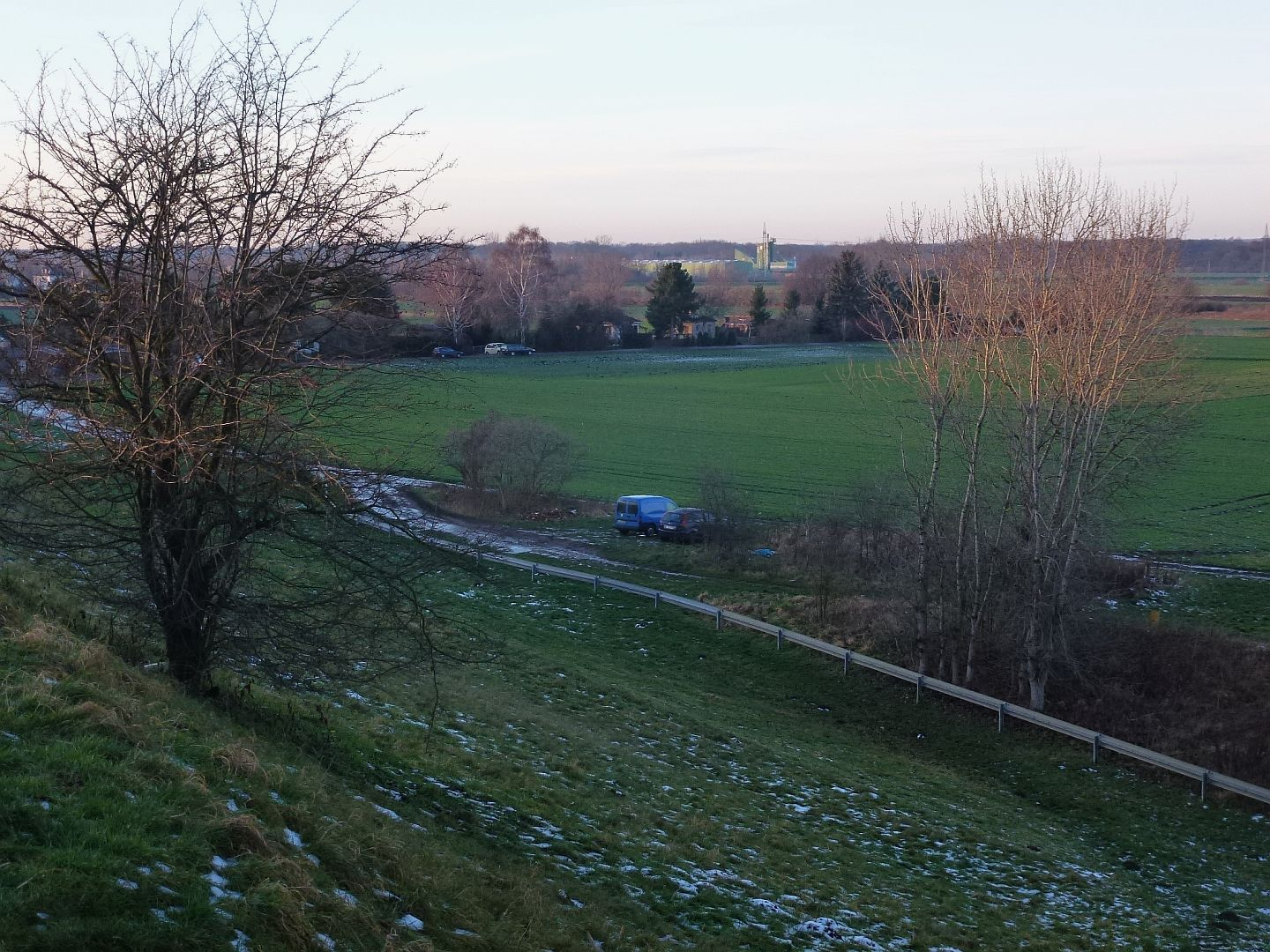 Blick vom Damm des Elster-Saale-Kanals auf das Kieswerk bei Kleinliebenau